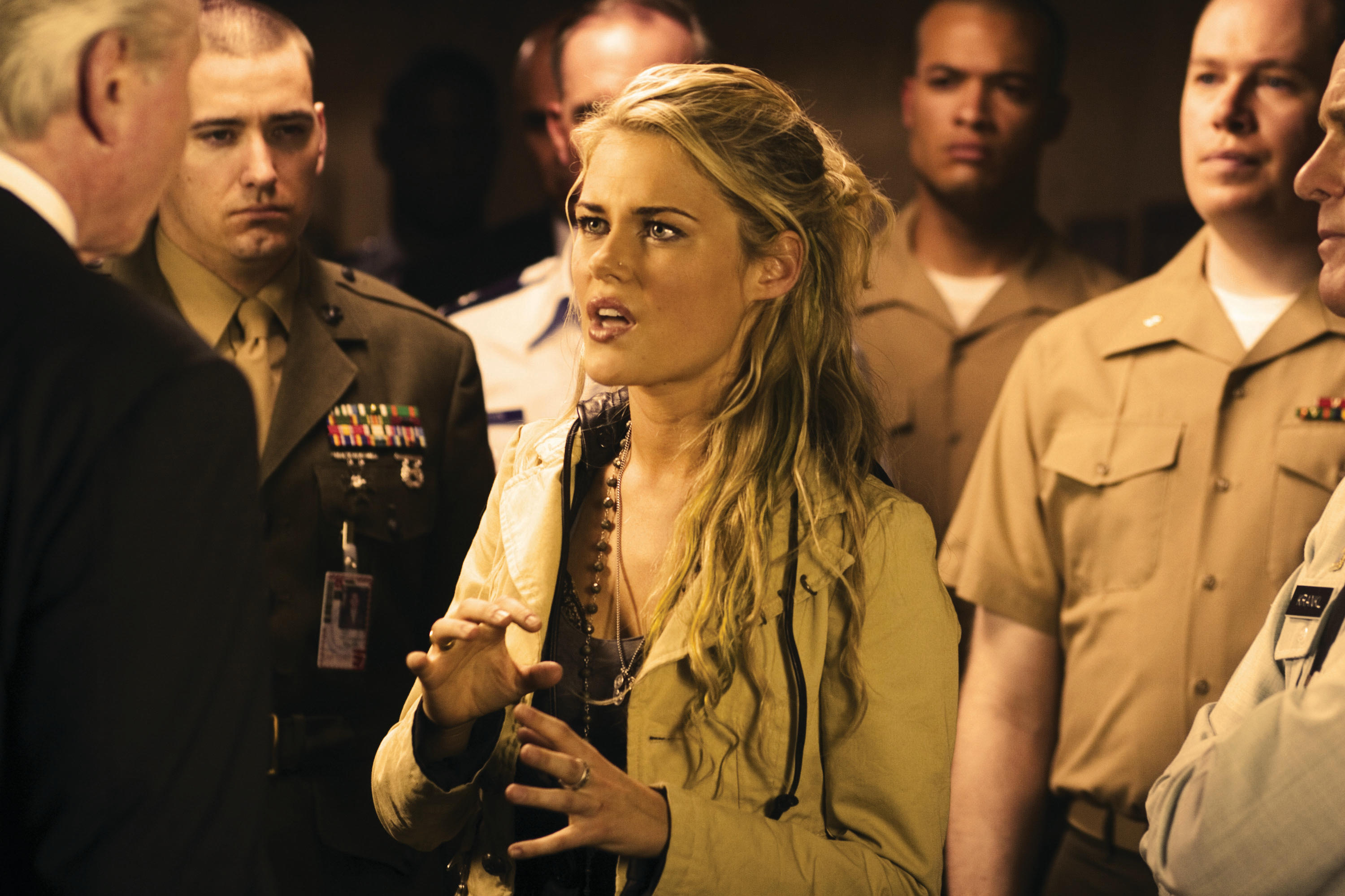 Film Title: Transformers